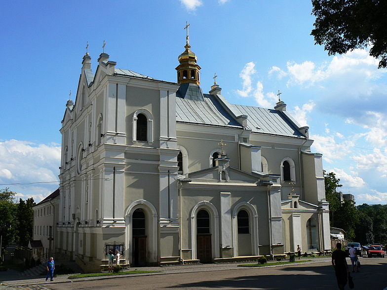 Церква Пресвятої Трійці в Дрогобичі (фасад), серпень 2008 року